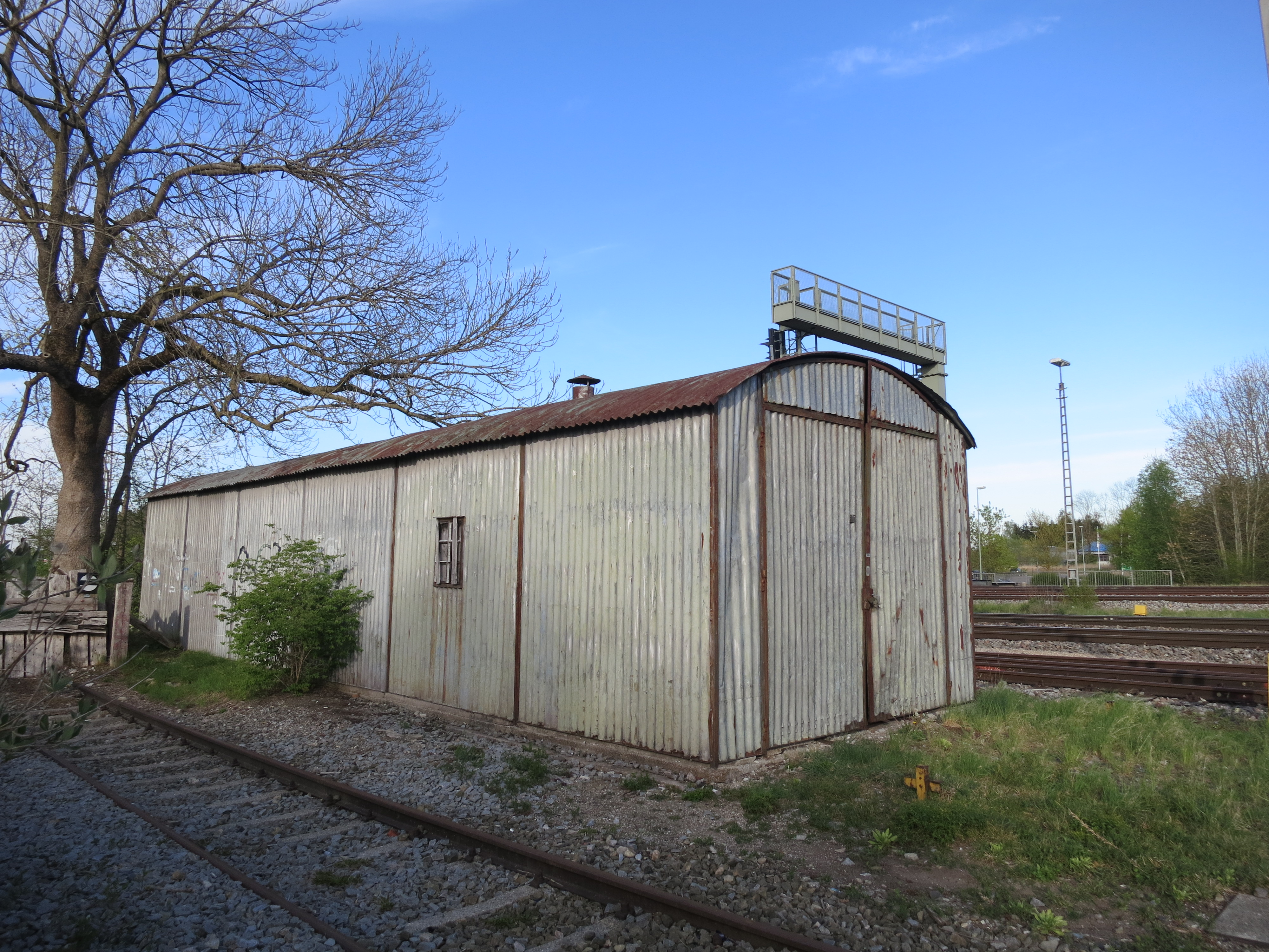 ehemaliger Kleinlokschuppen aus Wellblech am Bahnhof Bobingen